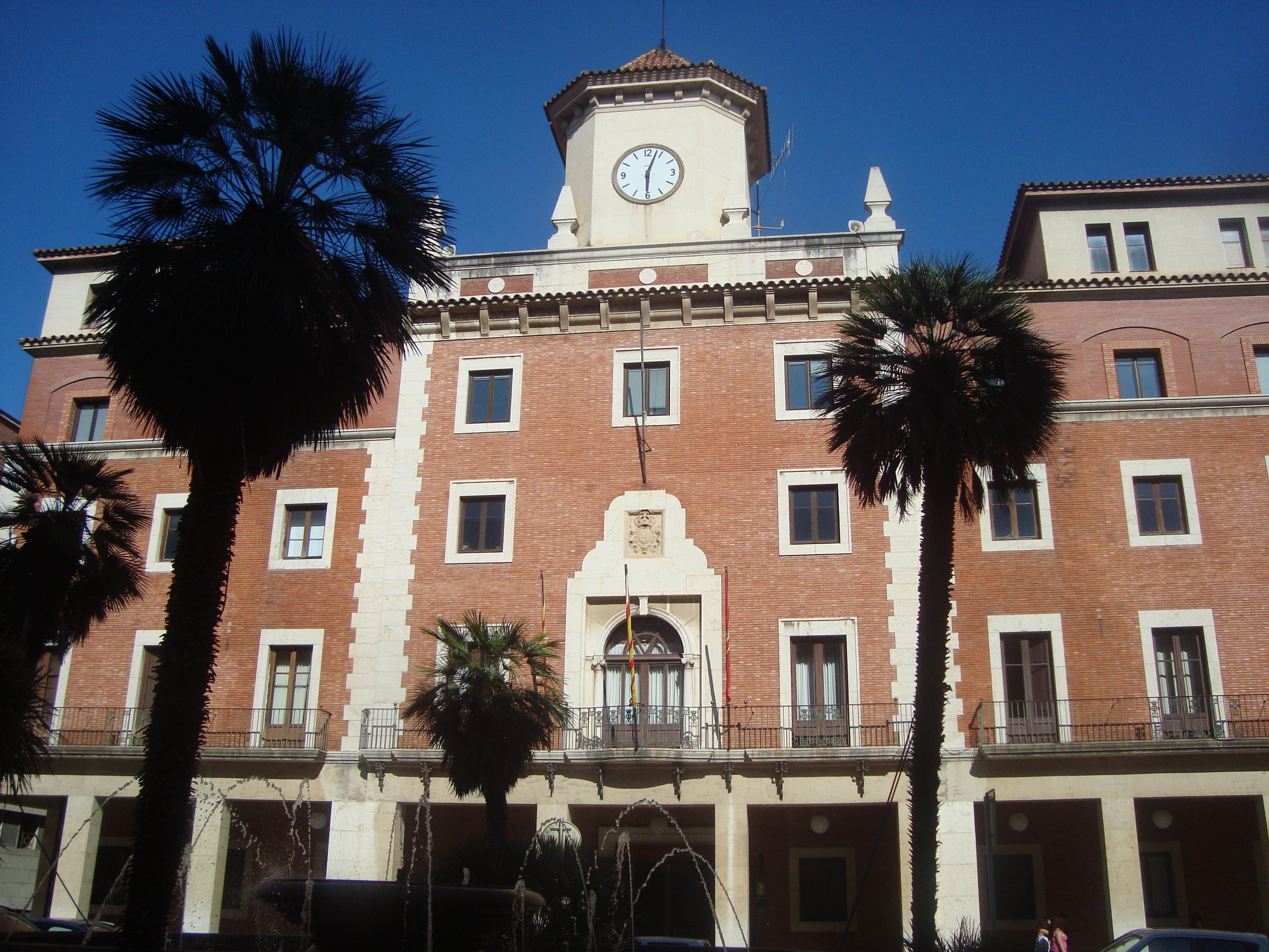 Ajuntament (Tortosa)